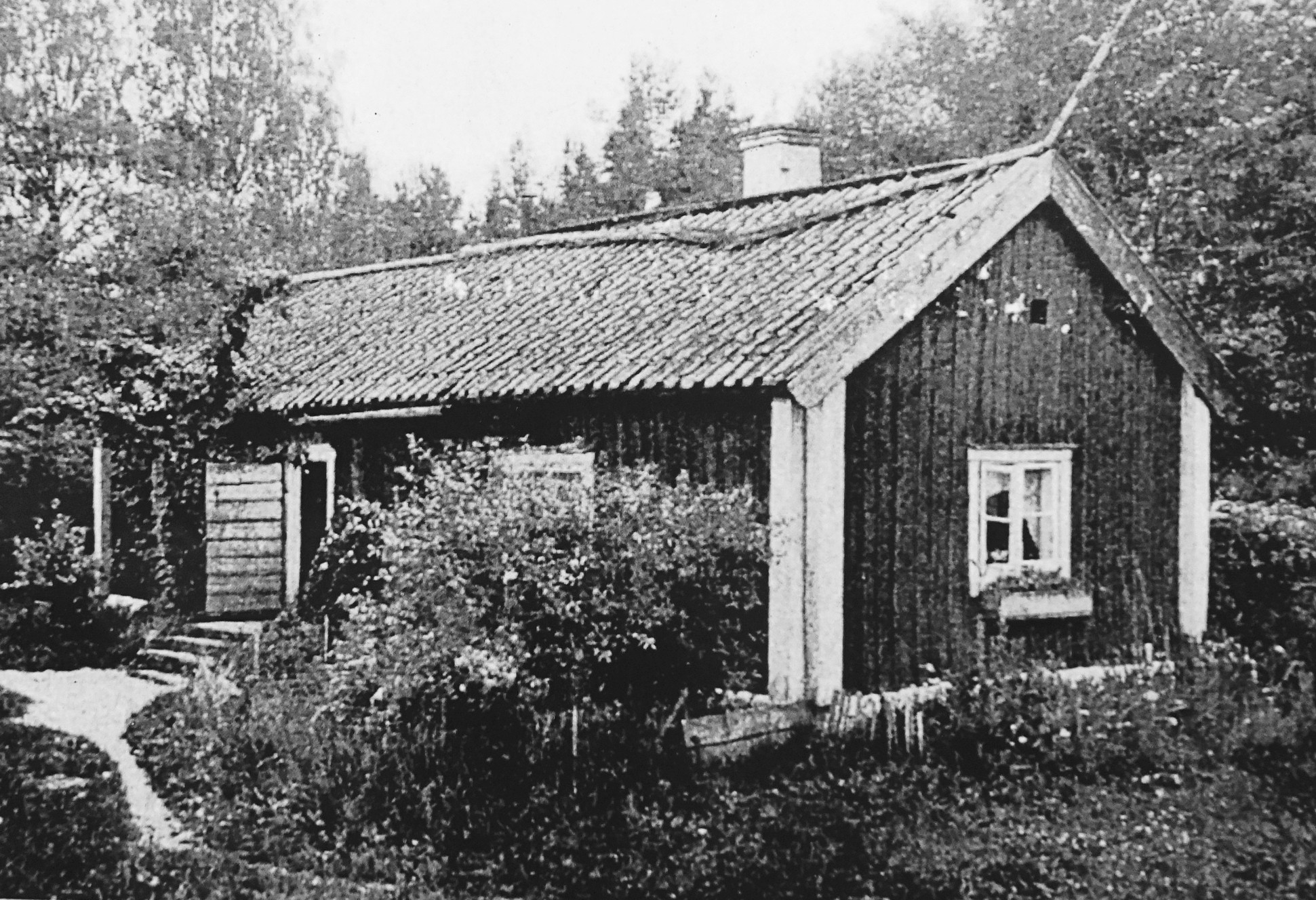 Igeltorp låg under Hallinge gård, revs 1941